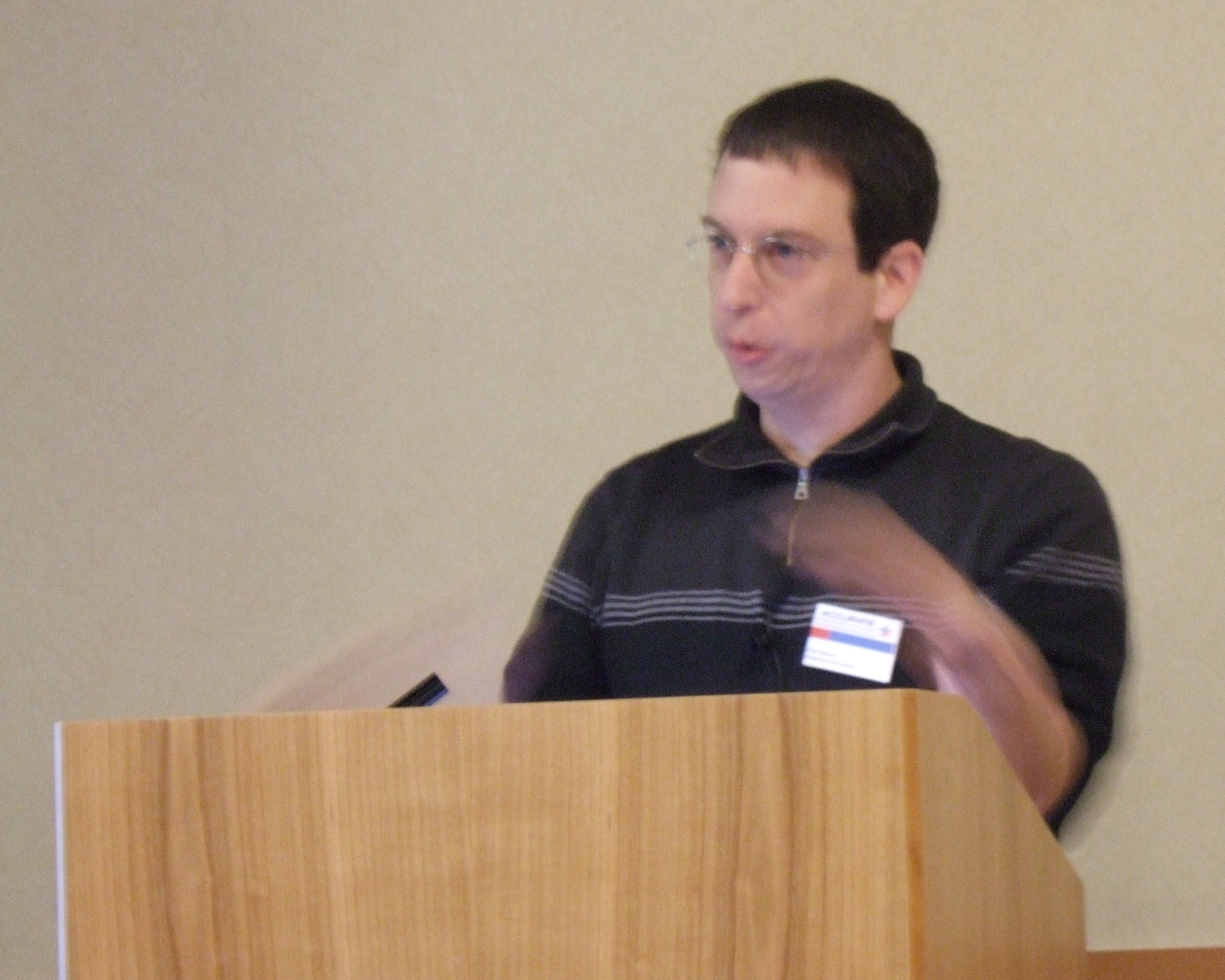 Dan Boneh